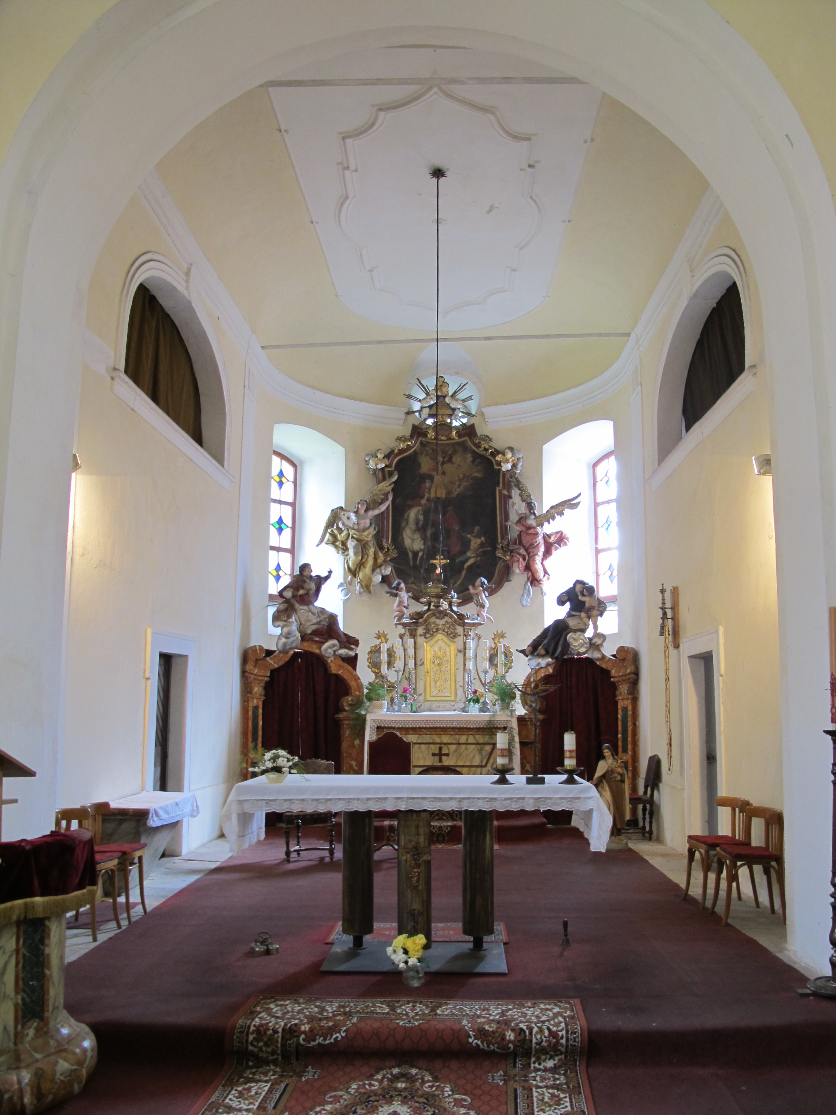 Rokokový kostel svatého Martina, Zámrsk.